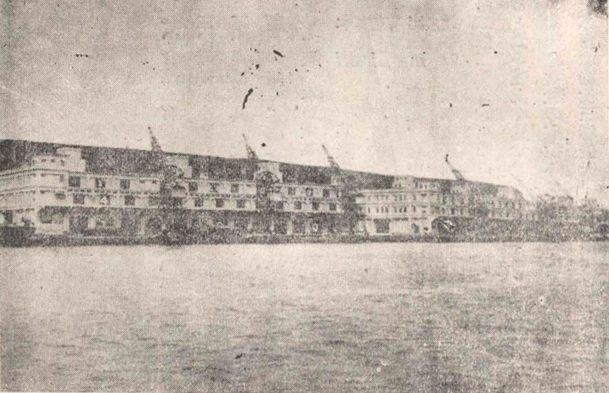 中文（台灣）: 台灣倉庫支式會社本社，位於基隆市明治町一丁目